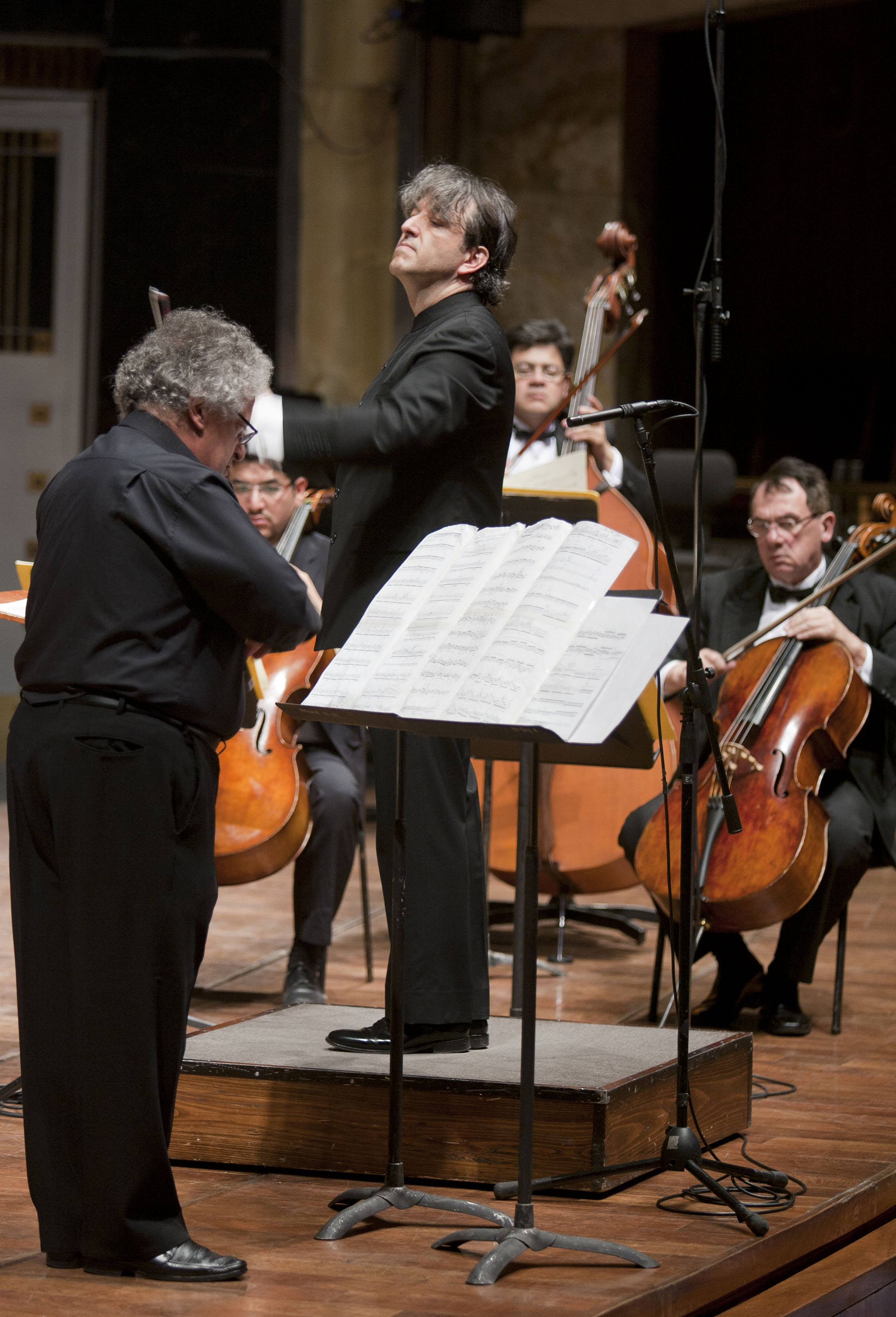 Sabado, 14 de jUNIO 2014. En el marco del 80o Aniversario del Palacio de las Bellas Artes se presento la Orquesta Filarmonica de la Ciudad de Mexico acompañados del gran violinista Irvine Arditti quienes interpretaron el programa que incluye Concierto para violín, de György Ligeti, con el violinista Irvine Arditti, y Una vida de héroe de Richard Strauss, bajo la dirección del maestro José Areán. Foto: Octavio Nava